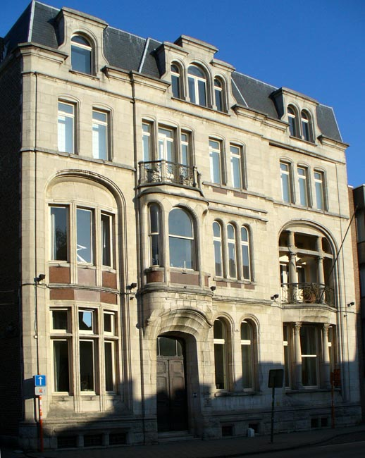 Huis Van Straelen Kuringersteenweg 35 Hasselt .